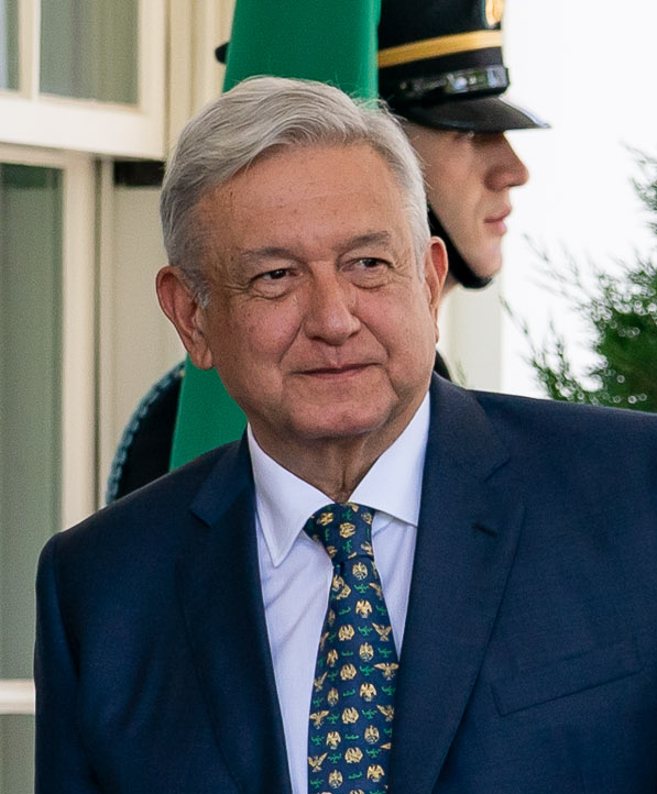 El presidente Andrés Manuel López Obrador de visita en la Casa Blanca, Estados Unidos.